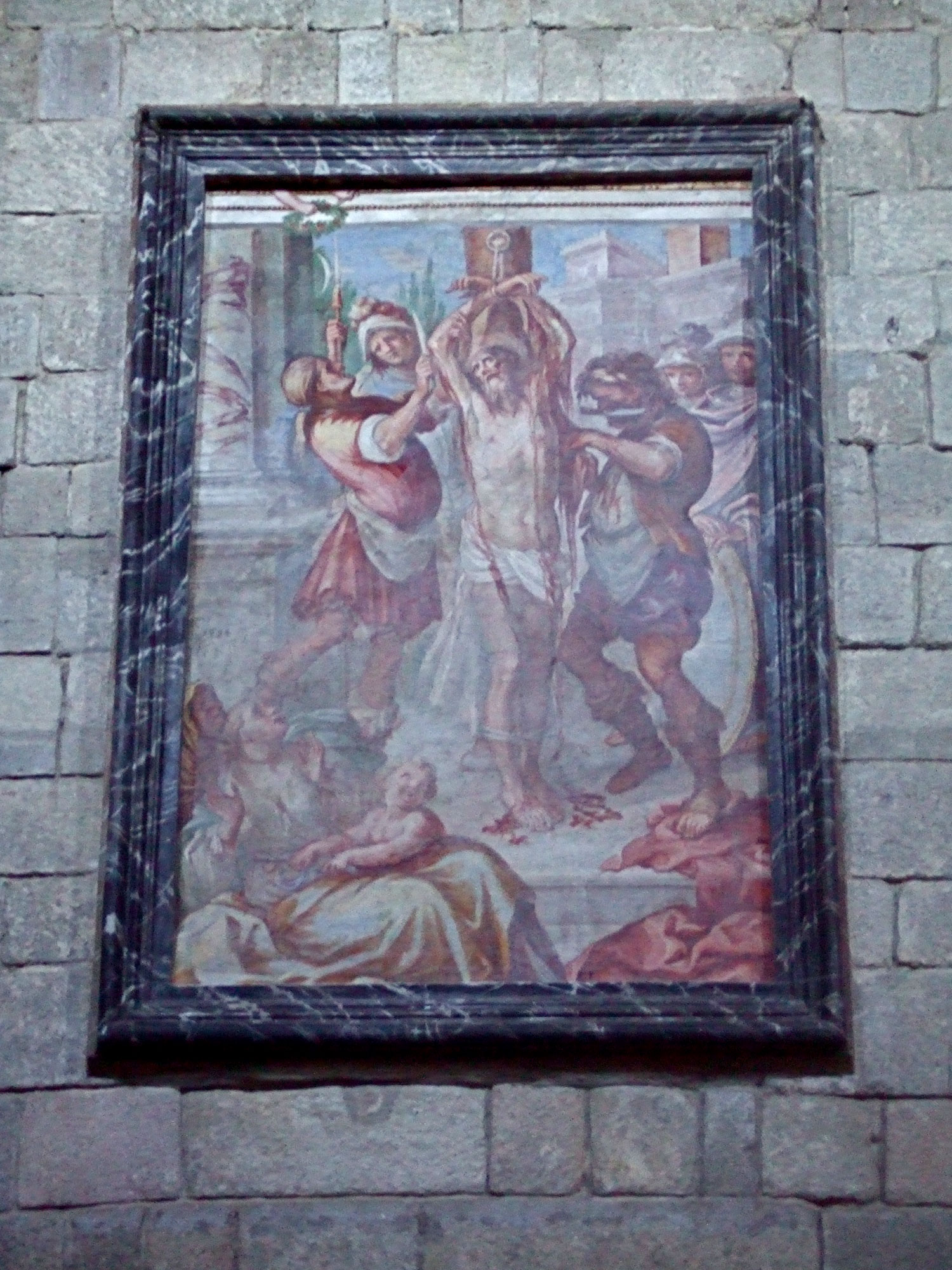 Tableau de Francesco Nasini : Martyre de San Bartolomeo à l'abbaye San Salvatore à Abbadia San Salvatore